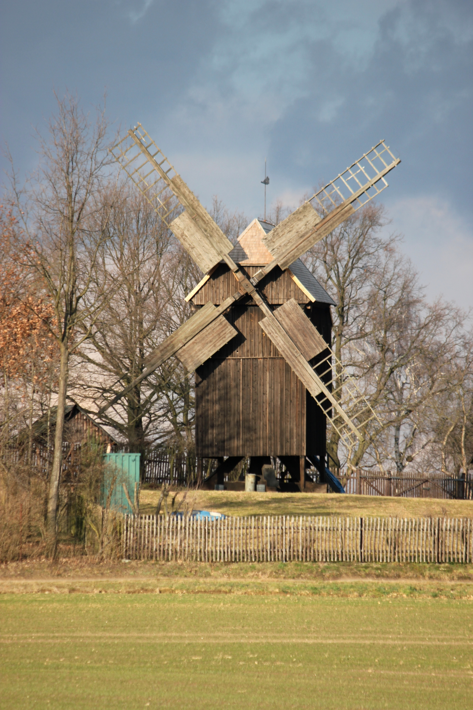 Hornjoserbsce: Stary wětrnik mjez Łuhom a Chasowom.